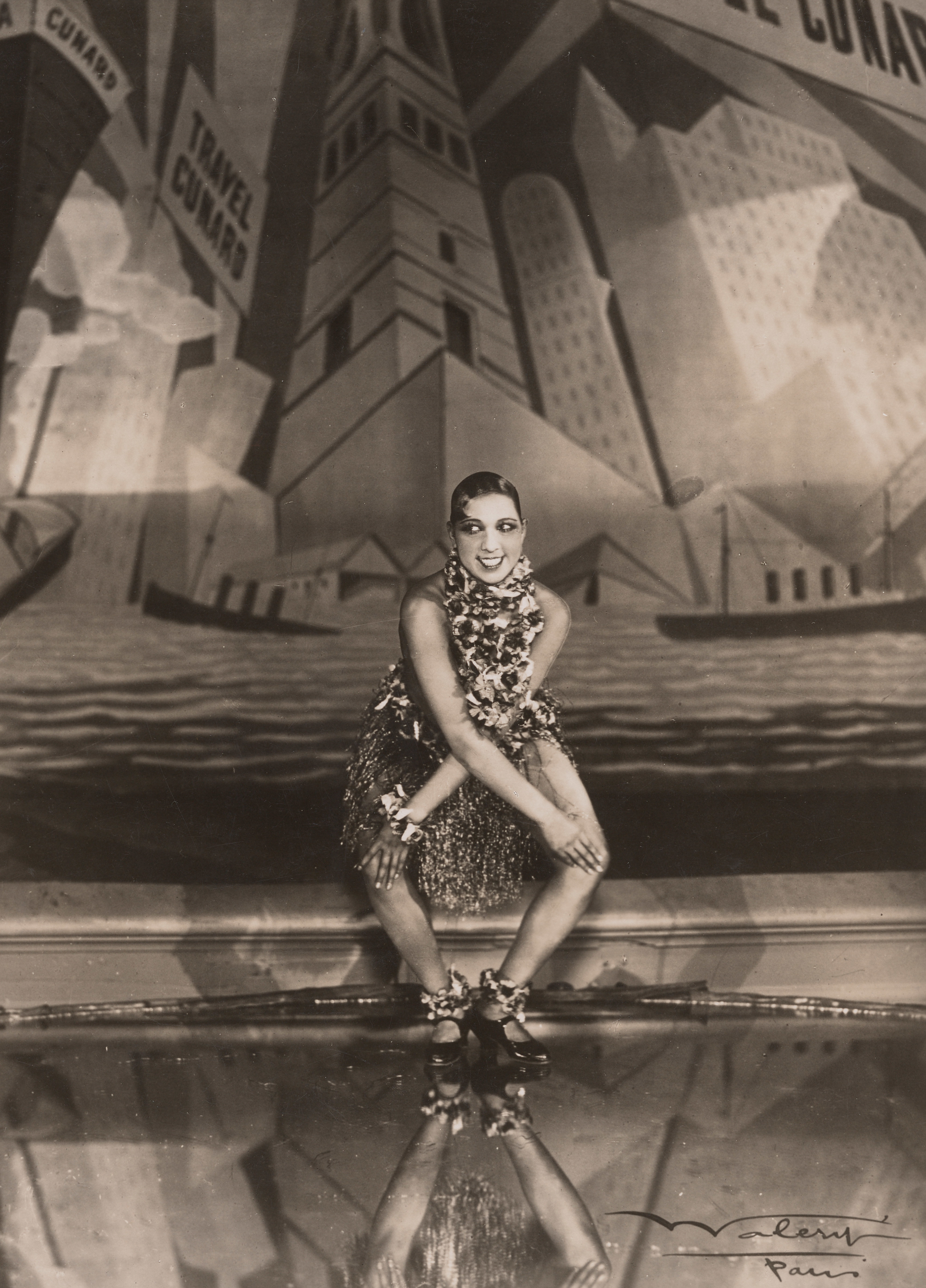 Josephine Baker dancing the Charleston at the Folies-Bergère, Paris -- Revue « La Folie du jour » Dance